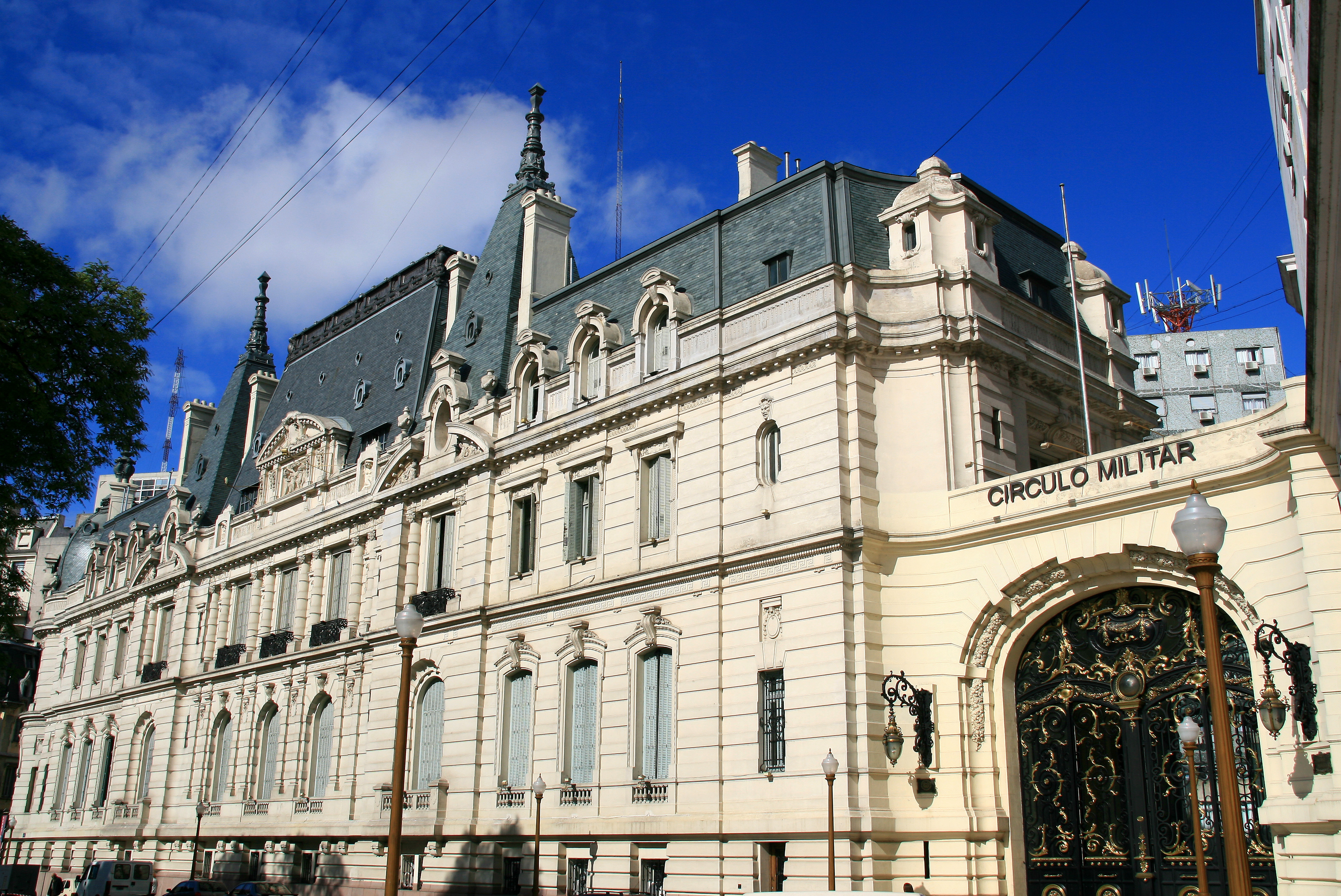 The Paz Palace, Buenos Aires.